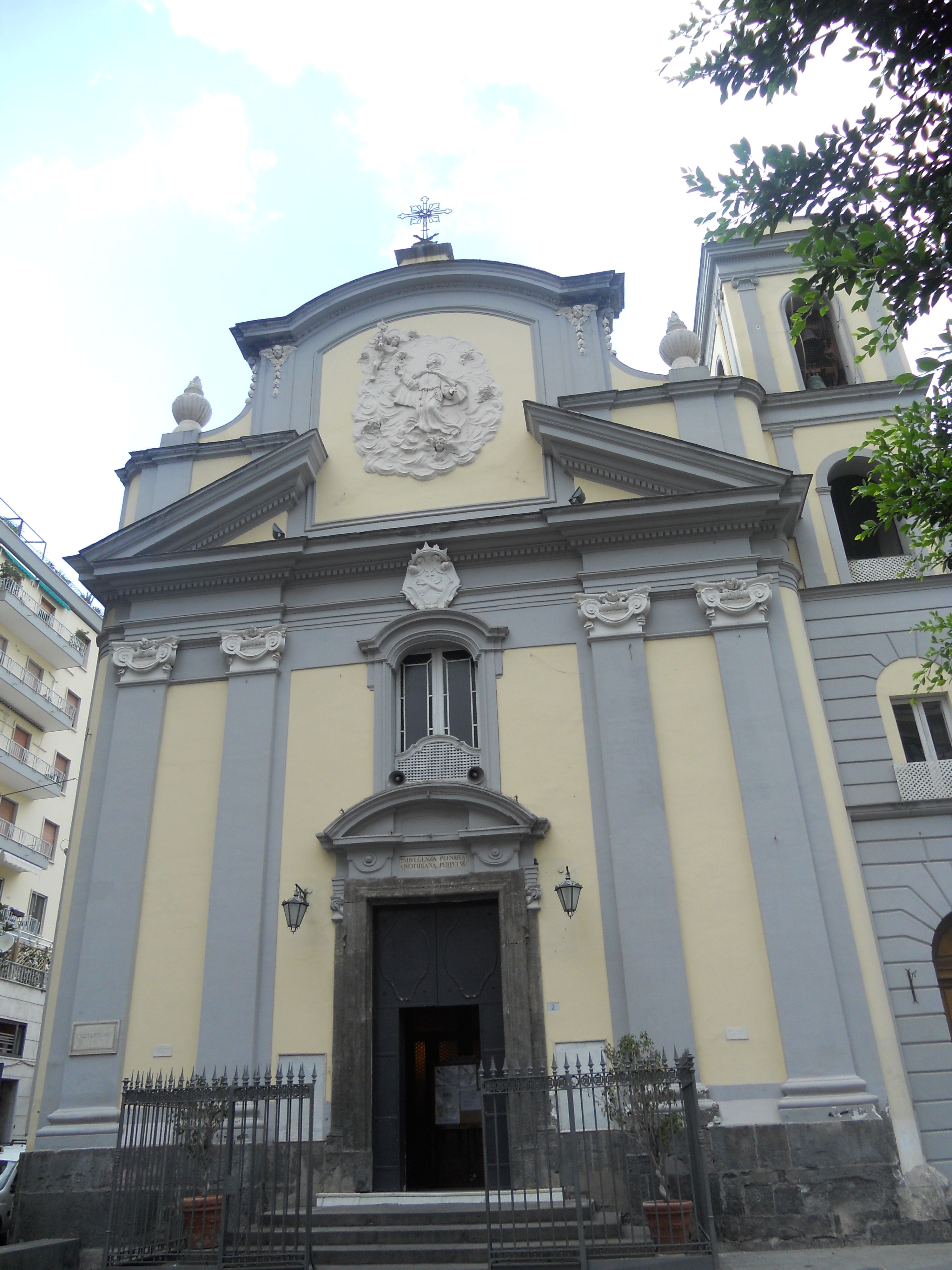 facciata Chiesa di San Pasquale a Chiaia